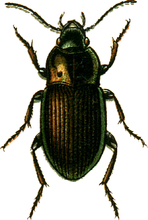 This file has been extracted from another file: Jacobs08.jpg